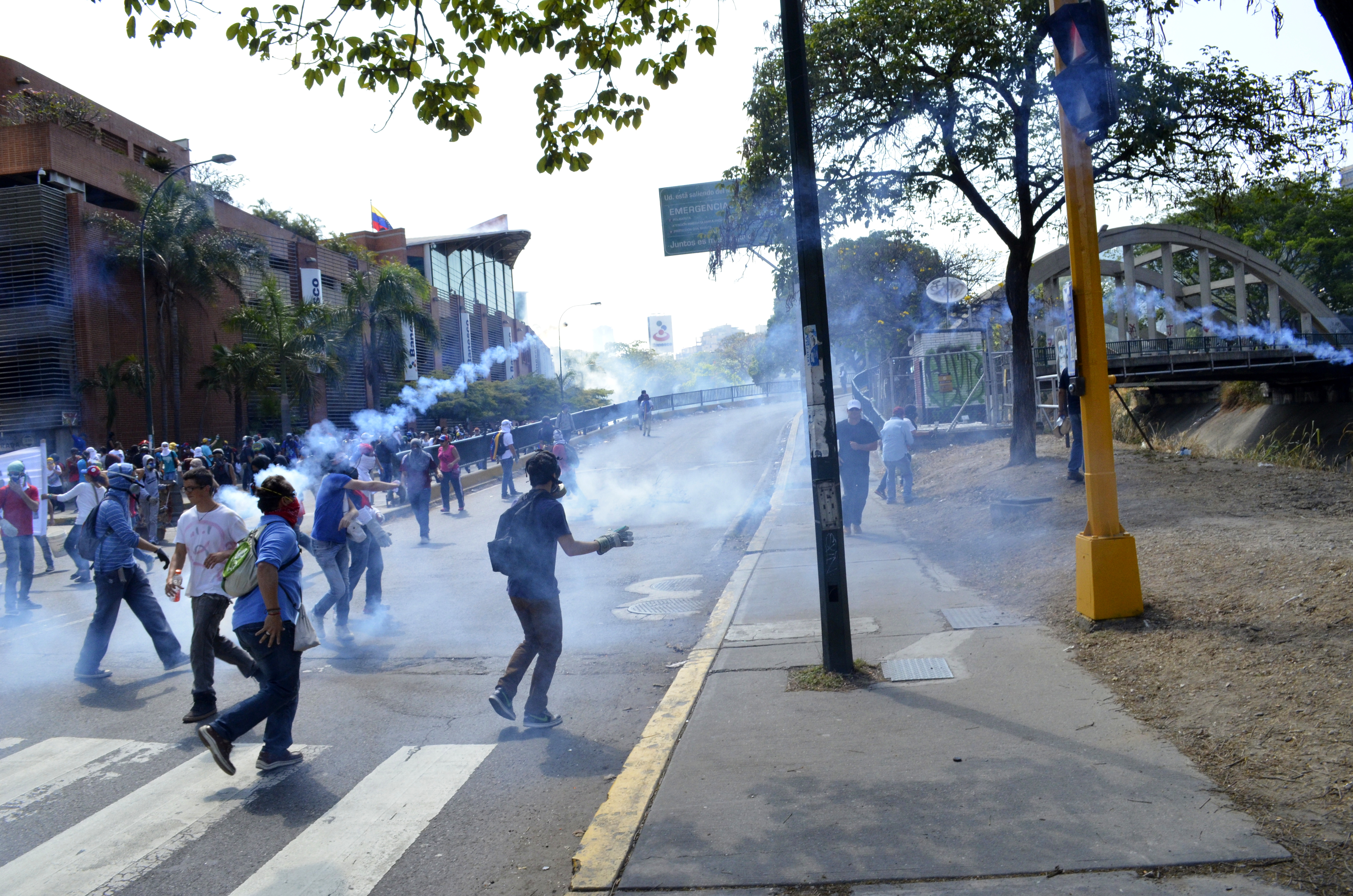 Se intentó marchar hasta Plaza Venezuela, pero después de mucho serpentear evitando uno y otro piquete de PNB bloqueado el recorrido, el enfrentamiento fue inevitable en Bello Monte.